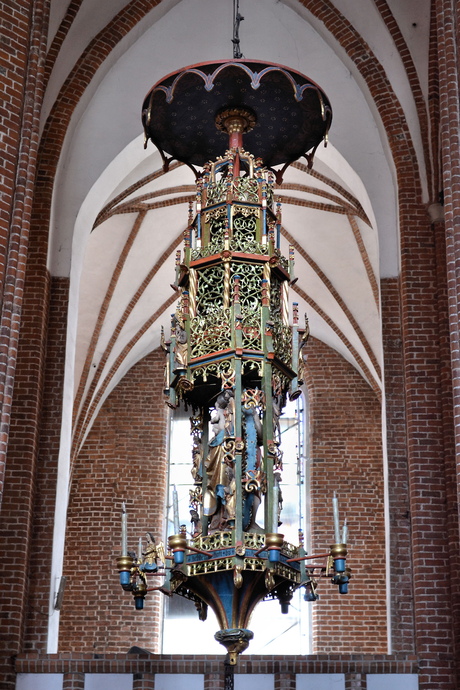 Żyrandol (świecznik) zwany "Koroną Schlieffenów" w katedrze w Kołobrzegu